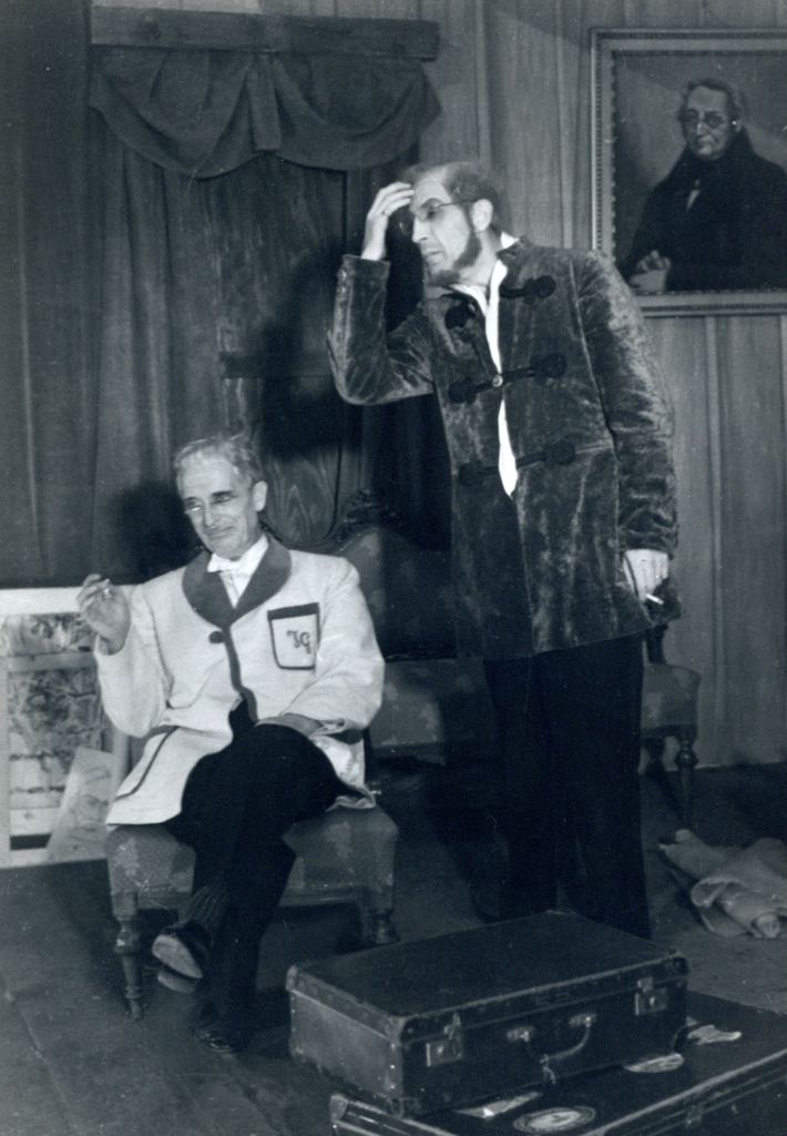 Miroslav Krleža, Gospoda Glembajevi, Drama SNG v Ljubljani. Na fotografiji: Ivan Levar (Ignacij Jacques Glembay), Vladimir Skrbinšek (Dr. phil. Leone Glembay).